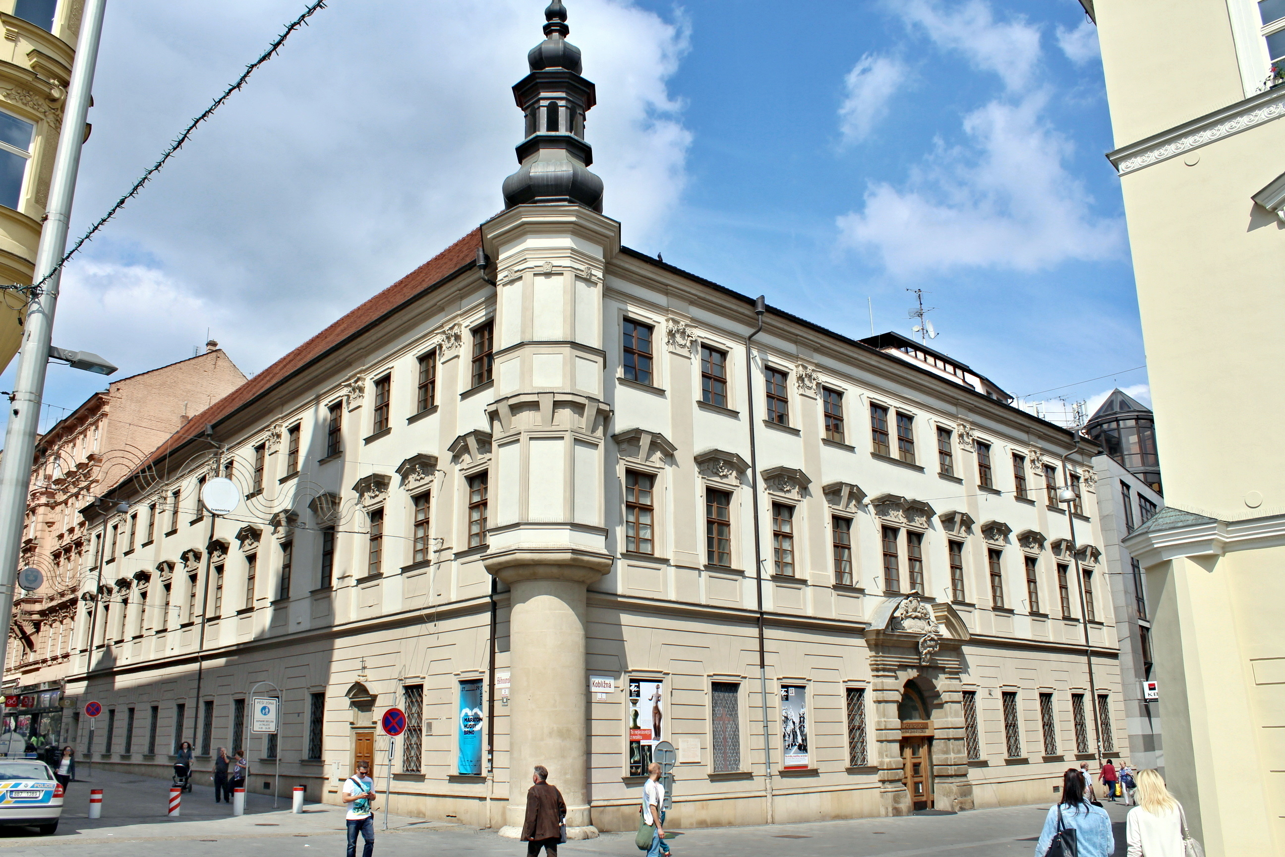 Brno, Palác šlechtičen